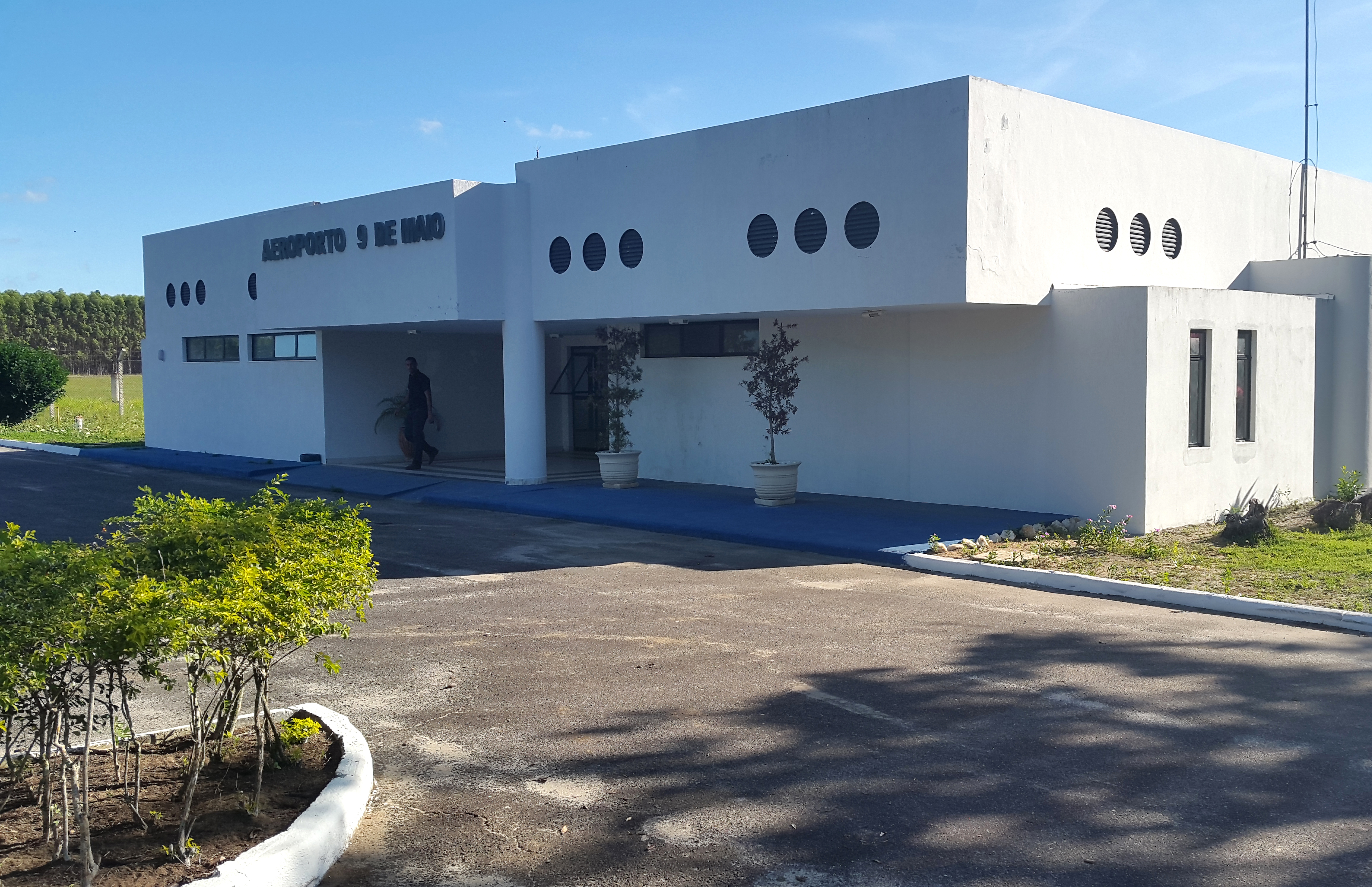 Visão da fachada do aeroporto.